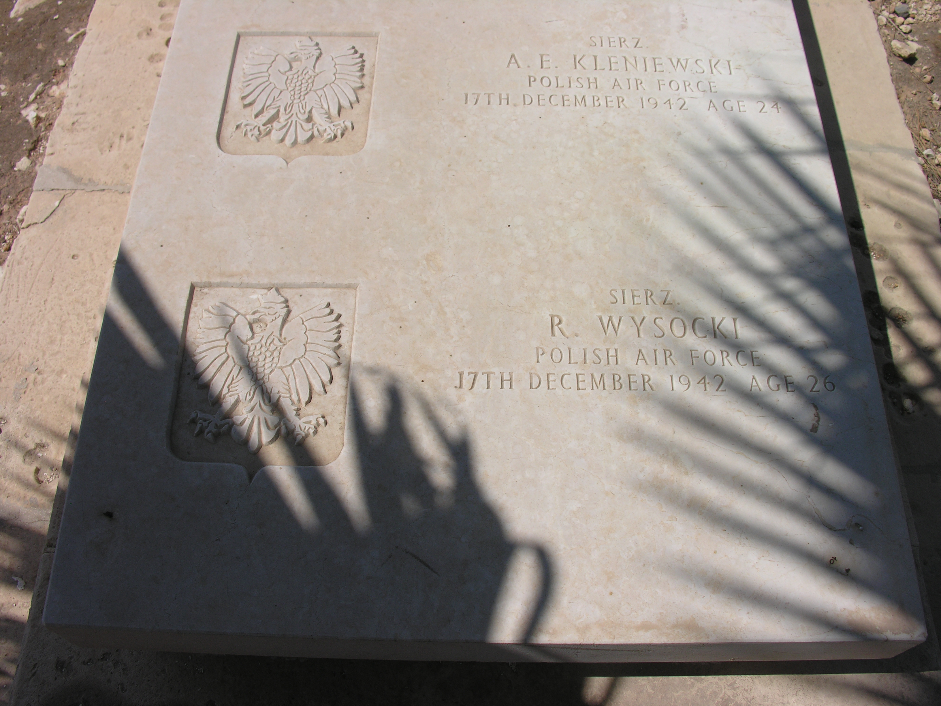 Polsckie groby na cmentarzu w Kalkarze na Malcie